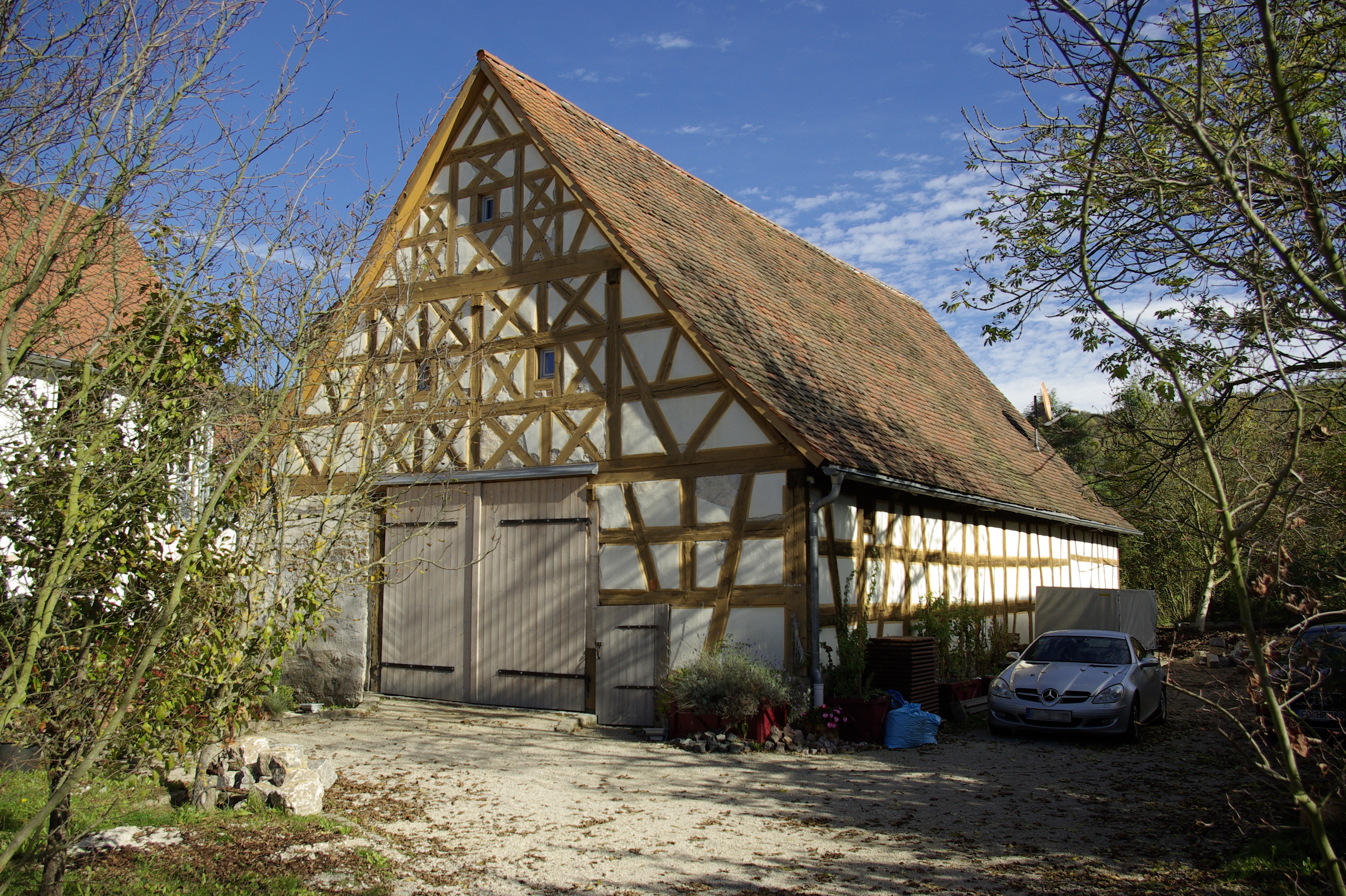 Mittelehrenbach 37, Fachwerkstadel, in Mittelehrenbach.